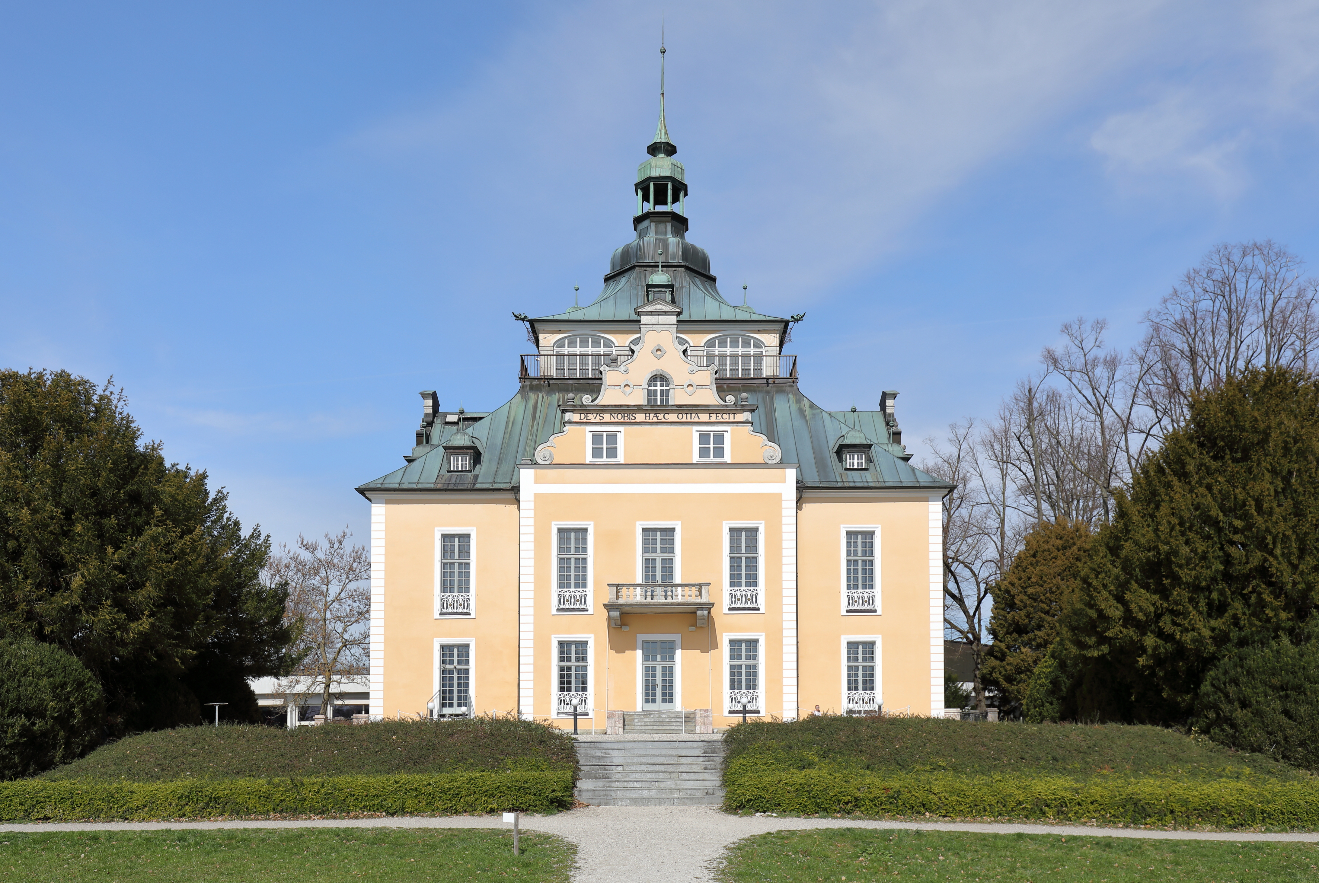 Südwestansicht der Villa Toscana in der oberösterreichischen Stadtgemeinde Gmunden. Das Gebäude wurde zwischen 1870 und 1877 inmitten eines großen Parks im Auftrag der verwitweten Großherzogin der Toskana Maria Antonie von Neapel-Sizilien als „Prinzendomizil“ errichtet.